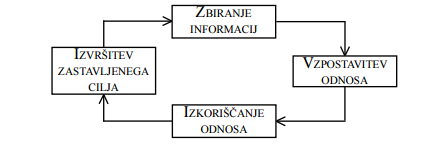 Življenski ciklus socialnega inženiringa